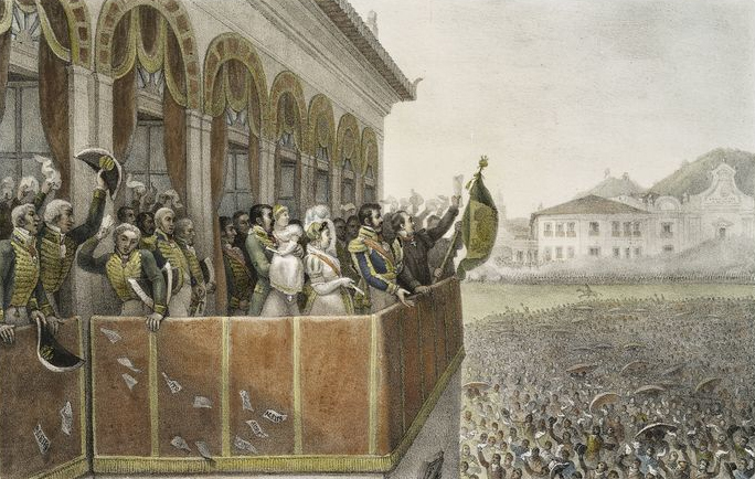 Aclamação de Dom Pedro I, Imperador do Brasil, no Campo de Sant'Ana, Rio de Janeiro.